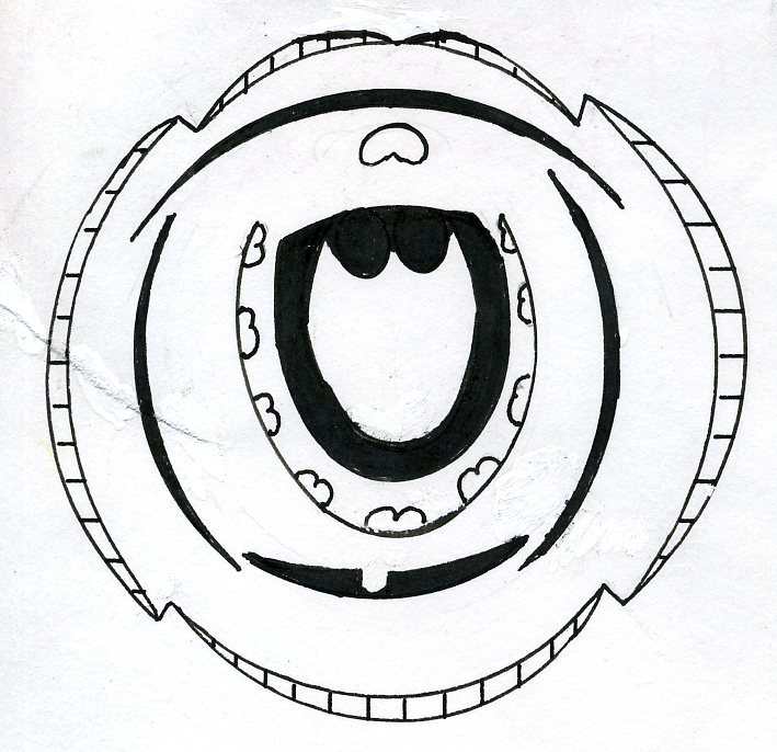 bloemdiagram Rode klaver (Trifolium pratense), Trifolium pratense floral diagram